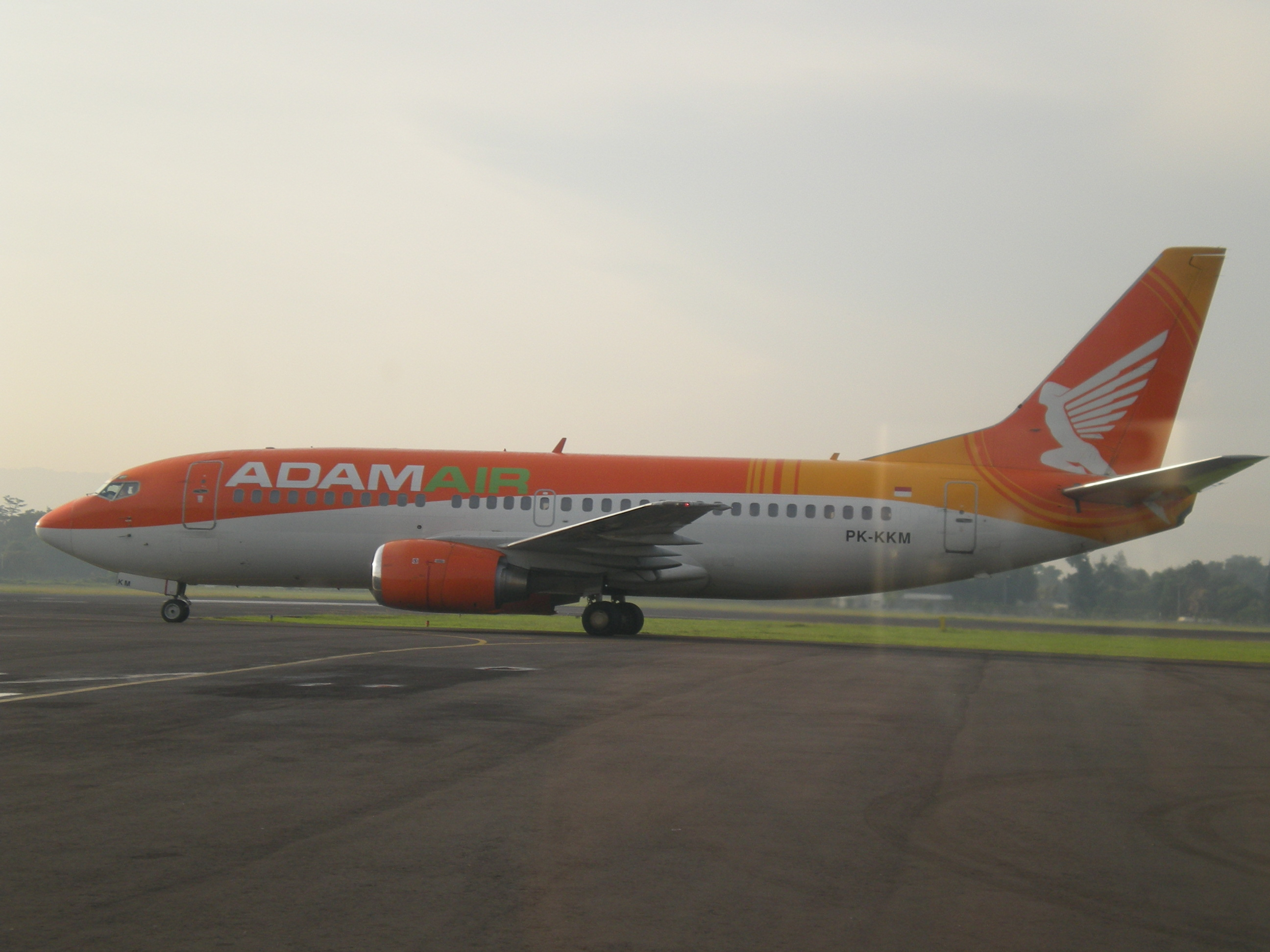 Adam Air aeroplane PK-KKM